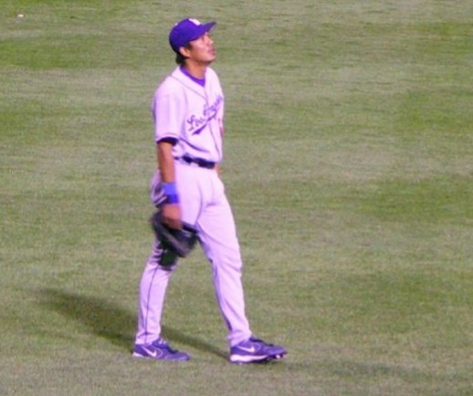 中文（台灣）: 2005年時期的陳金鋒。